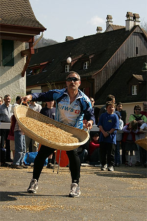 Eierleset in Arlesheim: Eierfänger